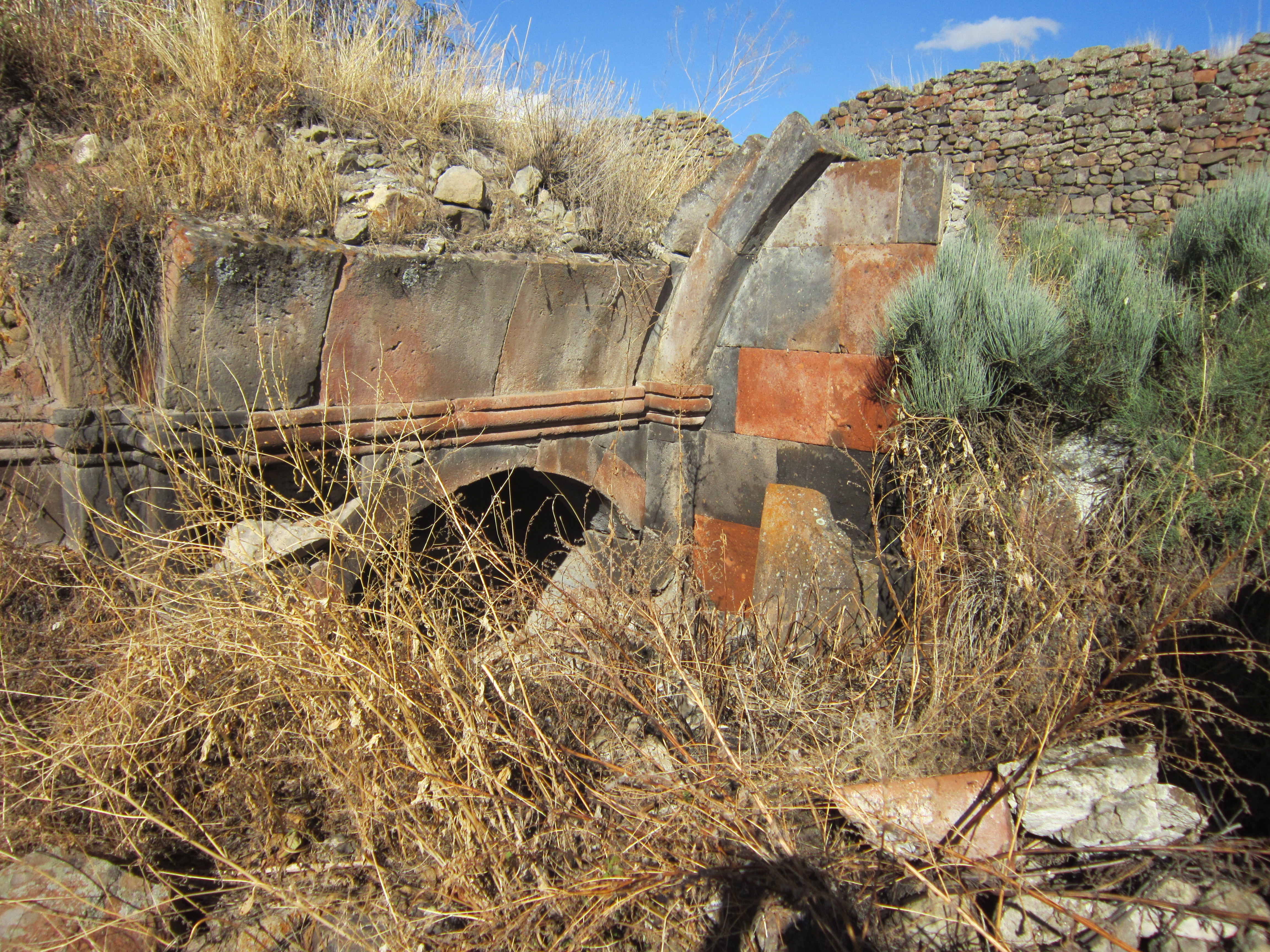 Հավուց Թառ 99.4/3